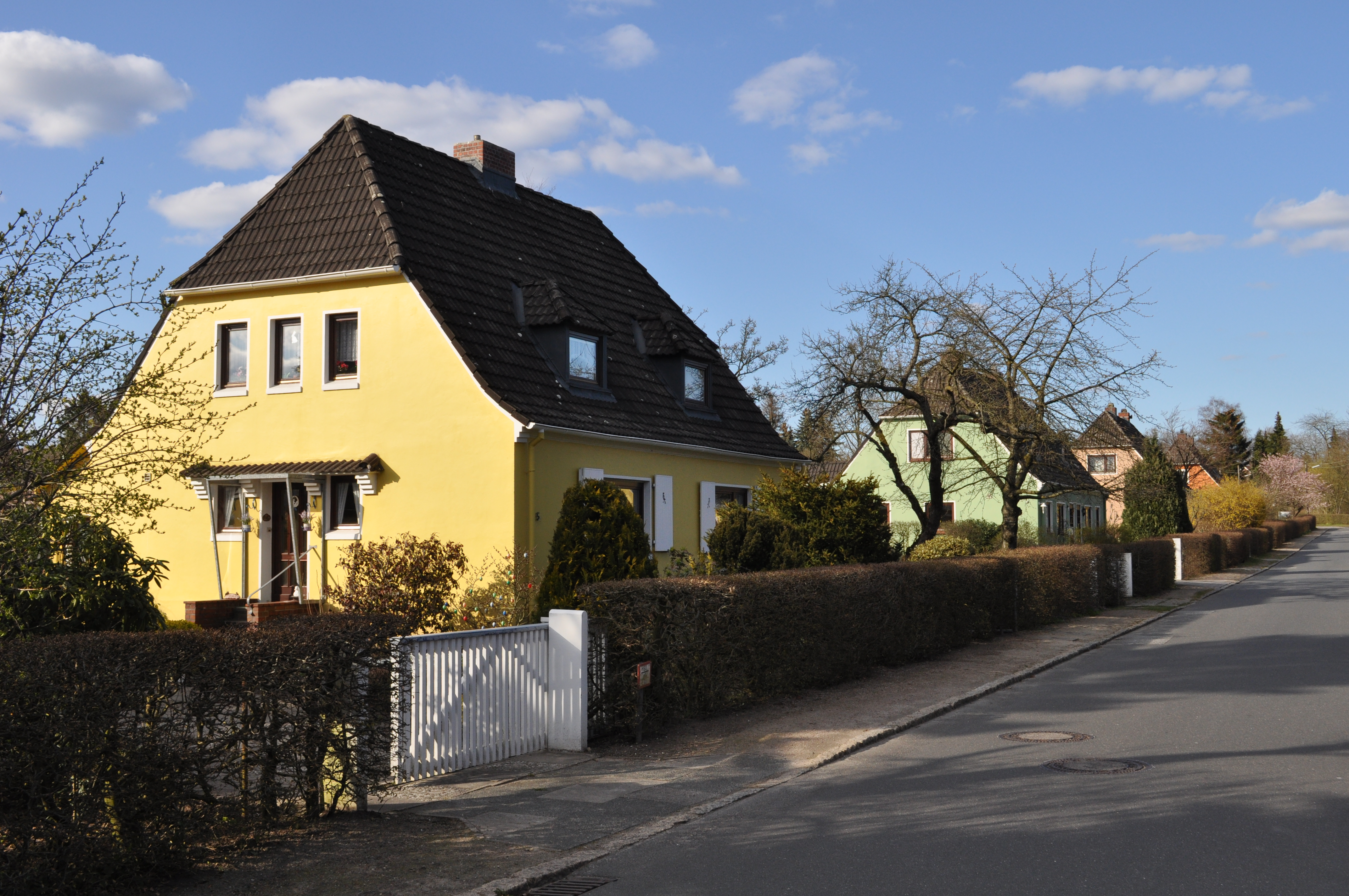 Häuser in der Straße Kornpfad in der Gartenstadt Berne in Hamburg-Farmsen-Berne.